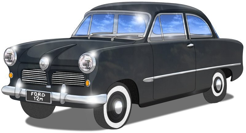 Ford Deutschland 12M, 1952